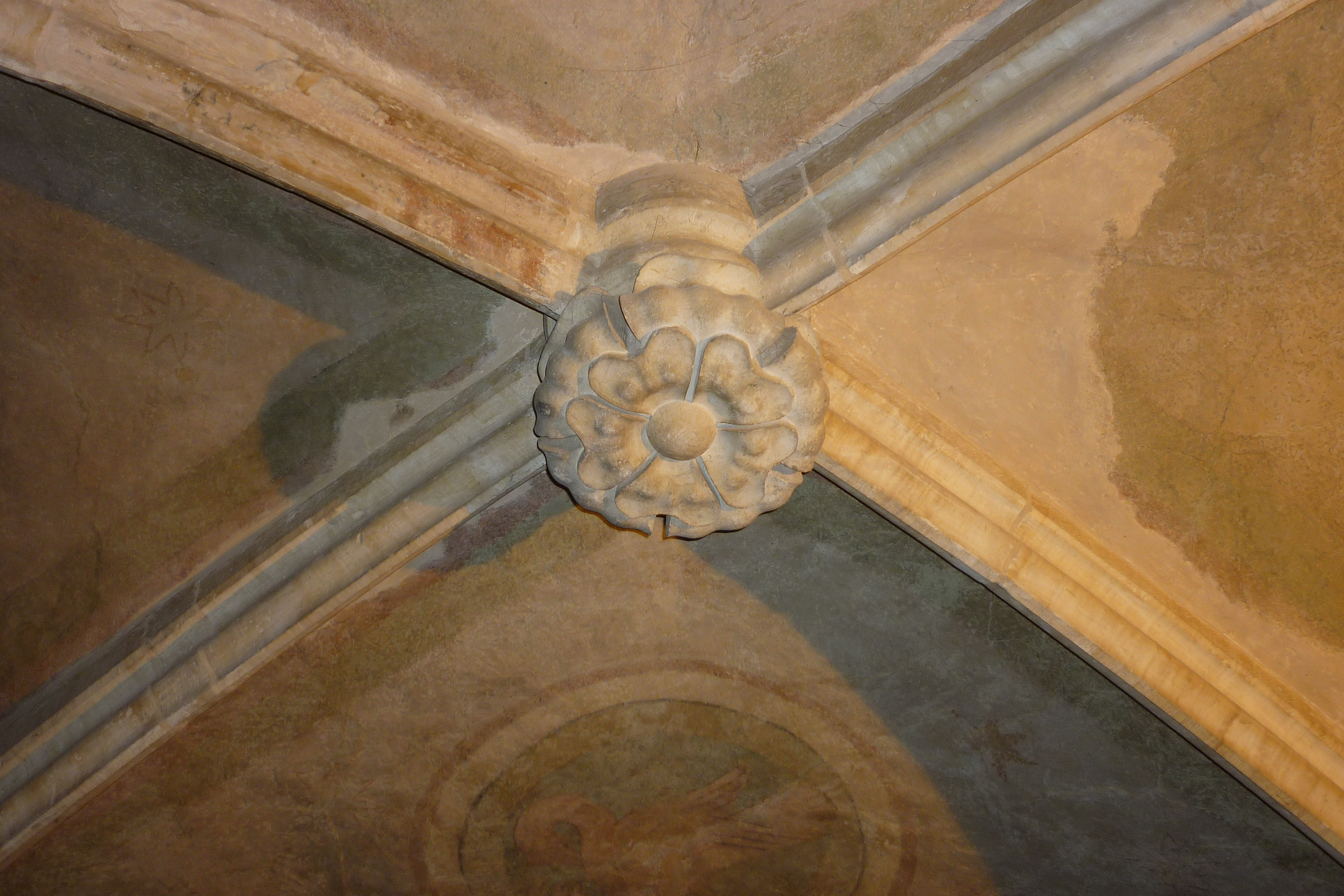 Svorník v přízemní kapli domu U Kamenného zvonu